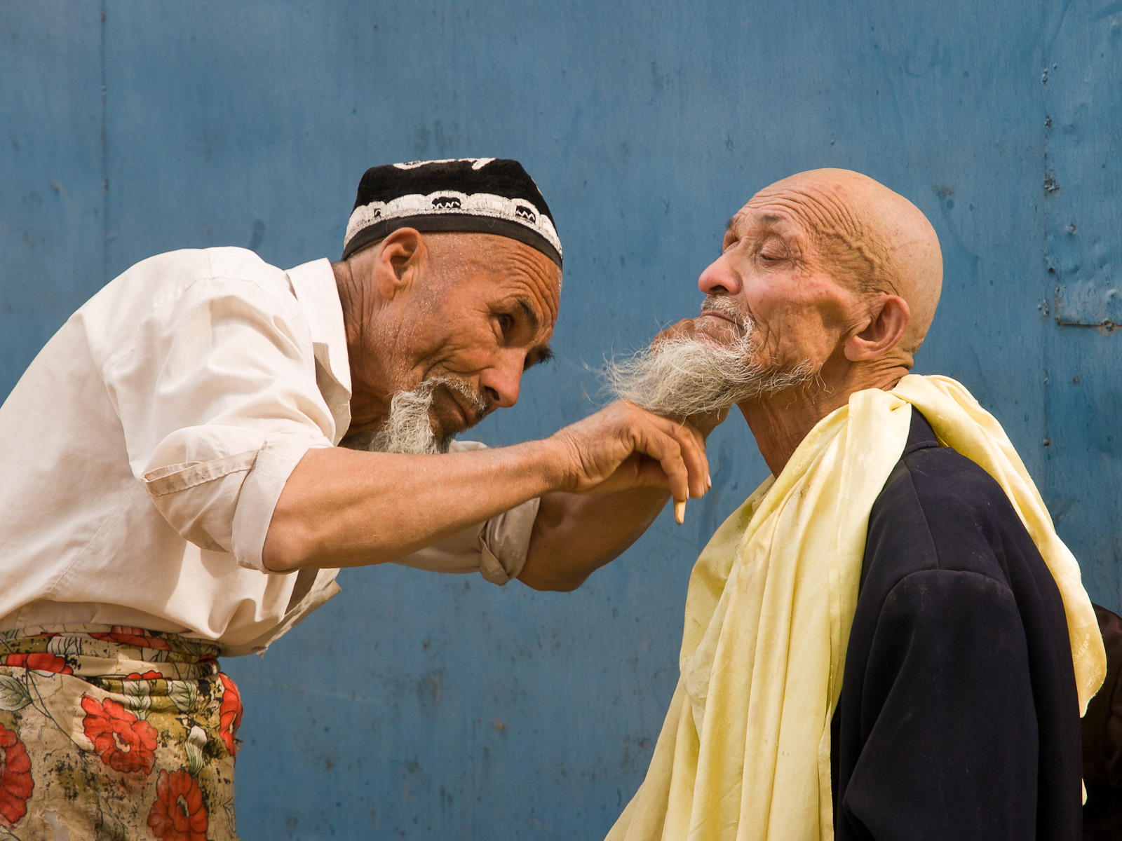 Barber in Kaxgar